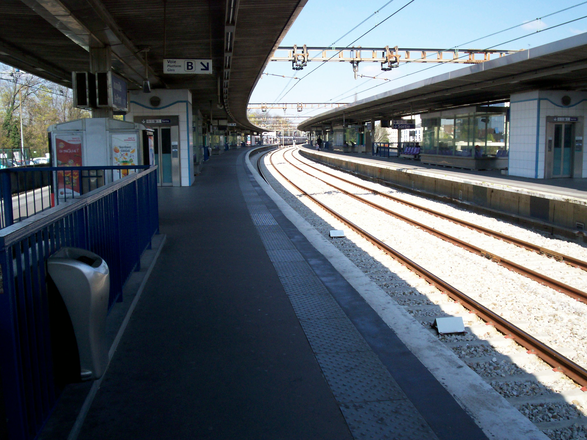 Gare de Joinville Le Pont